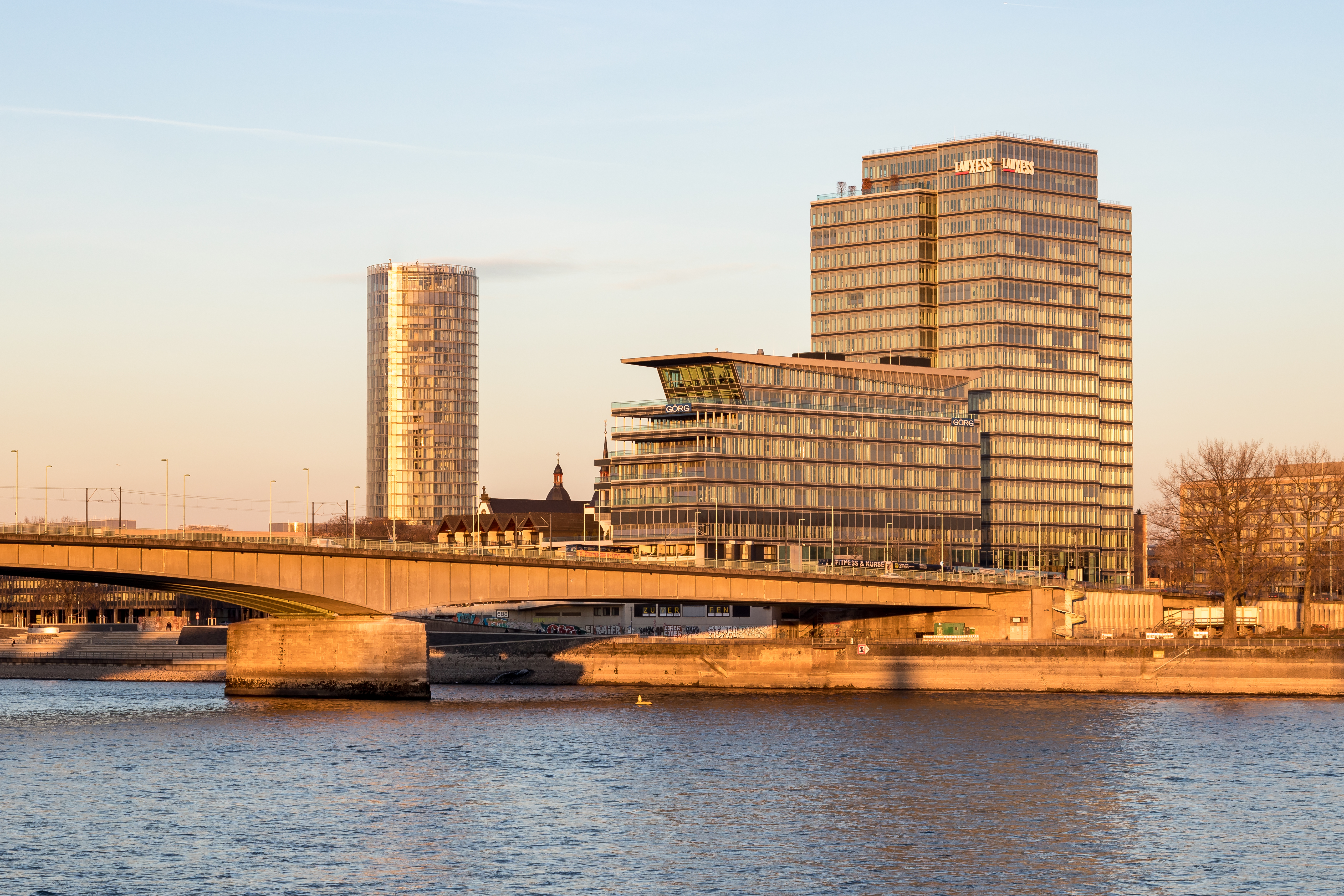 maxCologne - Gebäude in Köln-Deutz